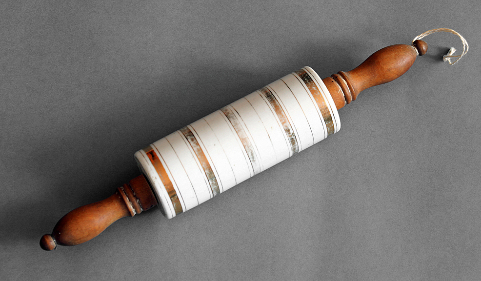 Nudelholz, Walze aus Porzellan, Griffe aus Holz